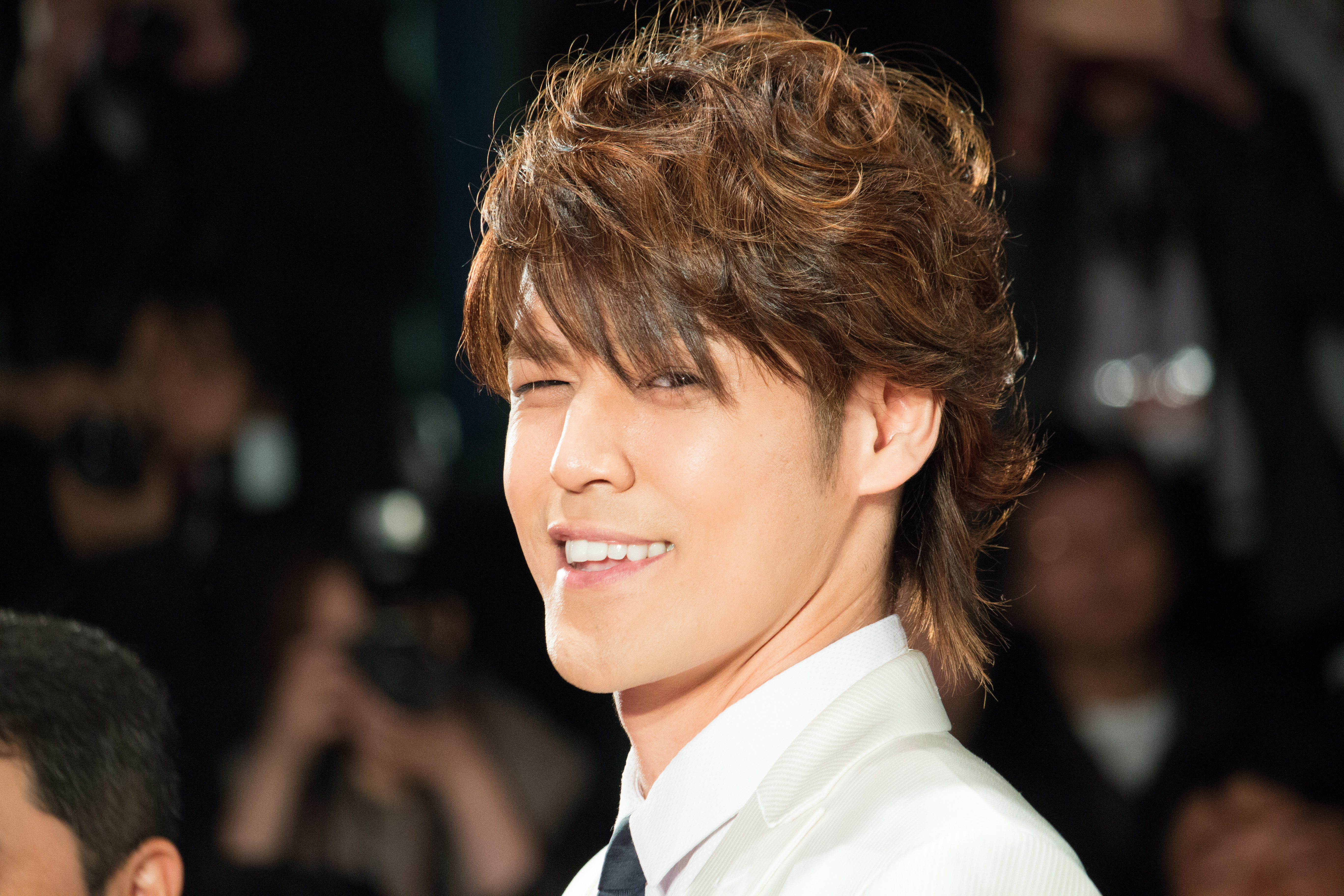 第28回 東京国際映画祭 オープニングセレモニー 宮野真守 (亜人 -衝動-)